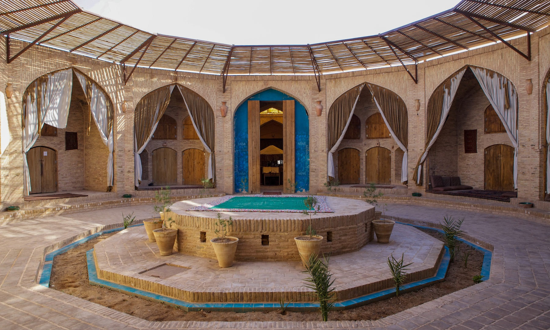 Caravanserai Zein-o Din, Yazd Province, Iran